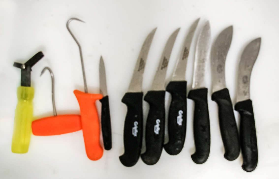 Verschiedene Fleischermesser und Griffhaken.